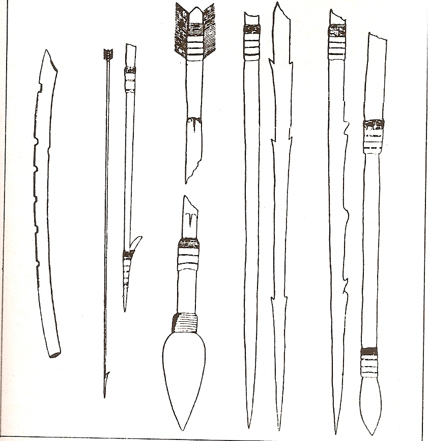 Armas de los pueblos originarios del Chaco